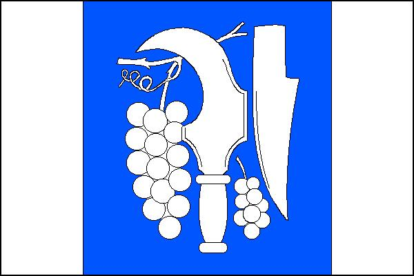 Vlajka obce Medlov